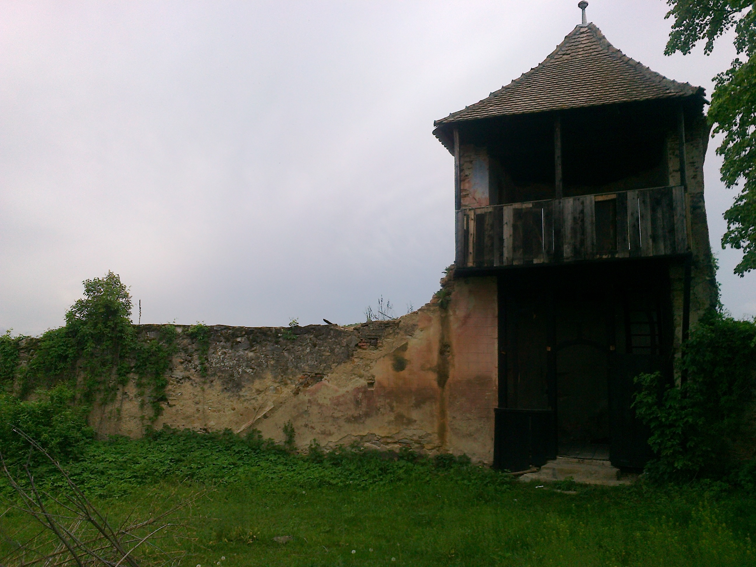 Turn de aparare la Biserica fortificata din Hosman, Sibiu 02